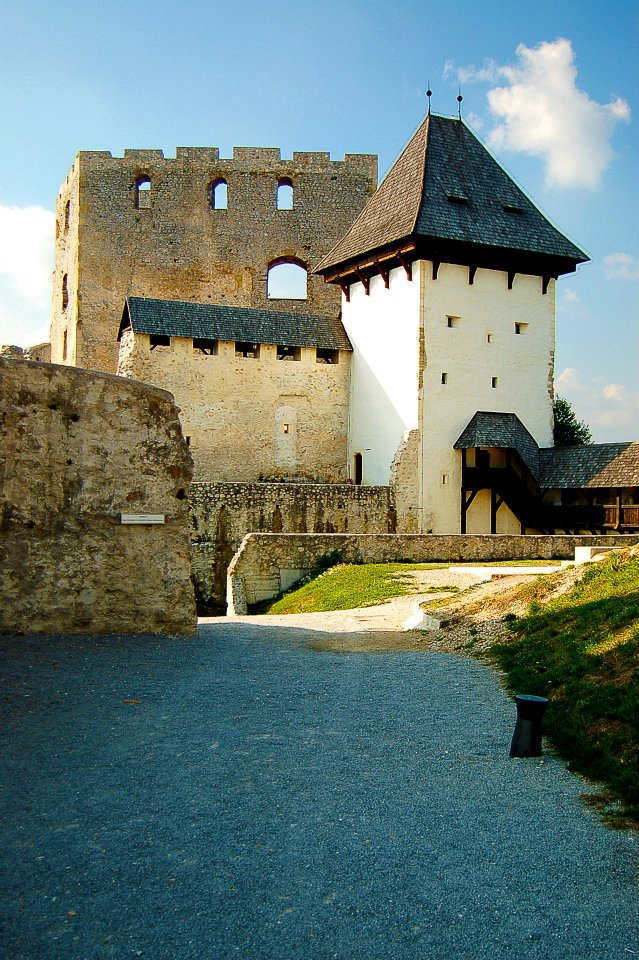 Celjski grad, pogled proti dvorišču